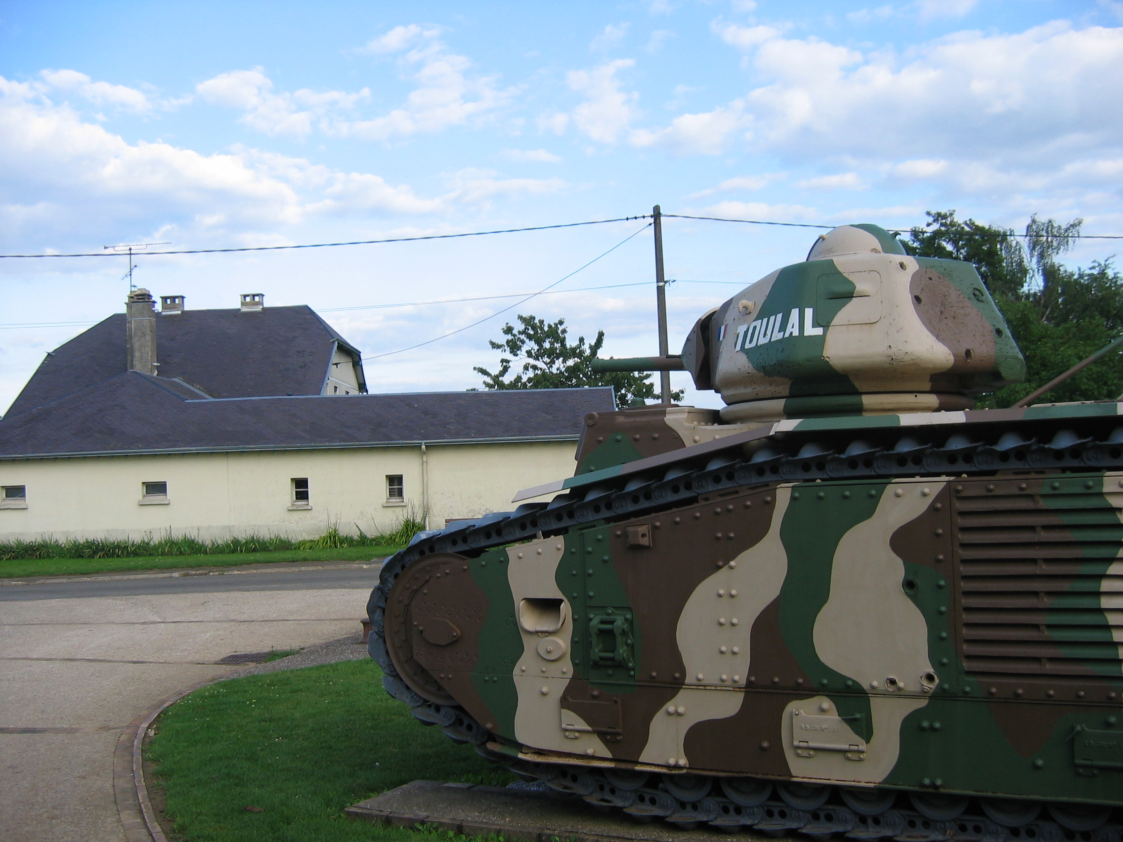 char français de 1940 à l'entrée de Stonne - village des Ardennes - France